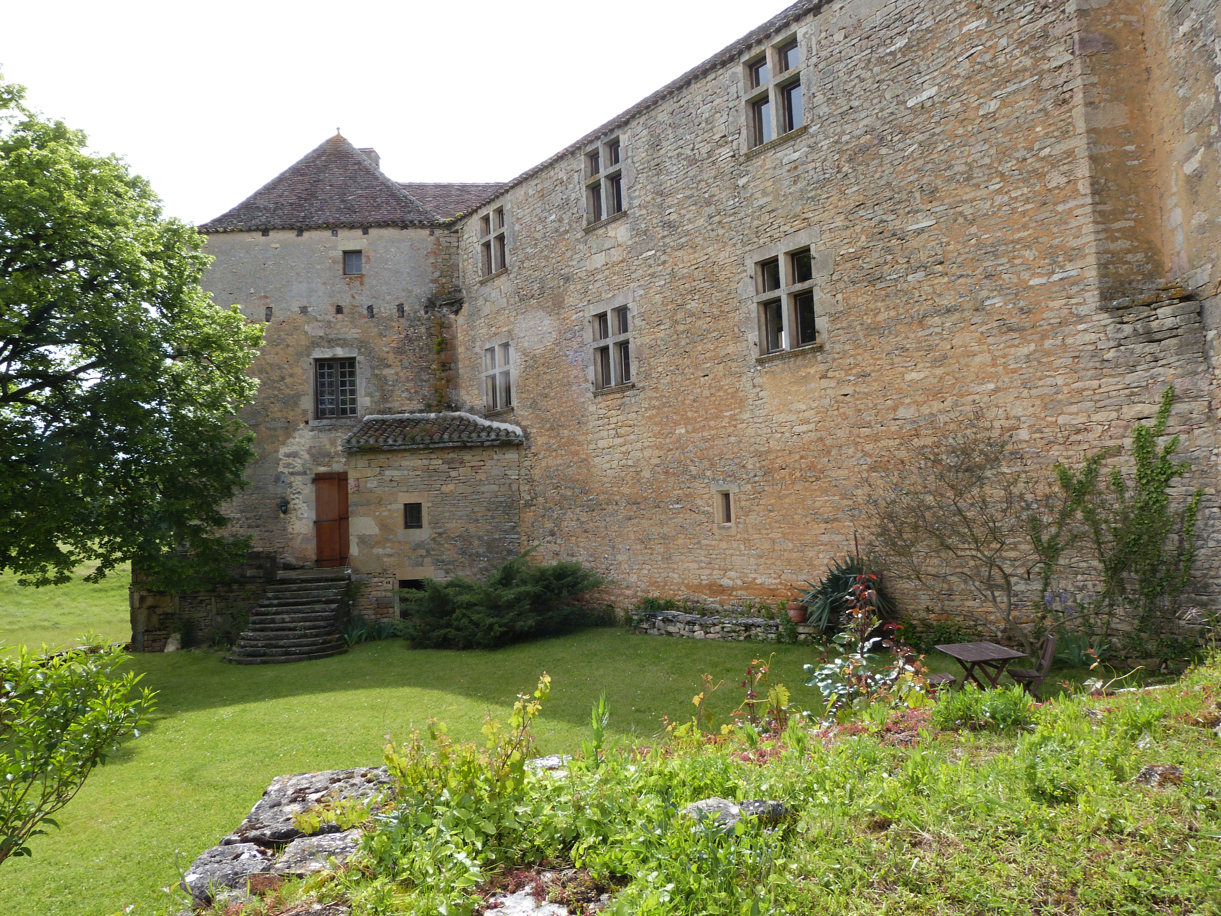 Château de Labastide (Inscrit) .